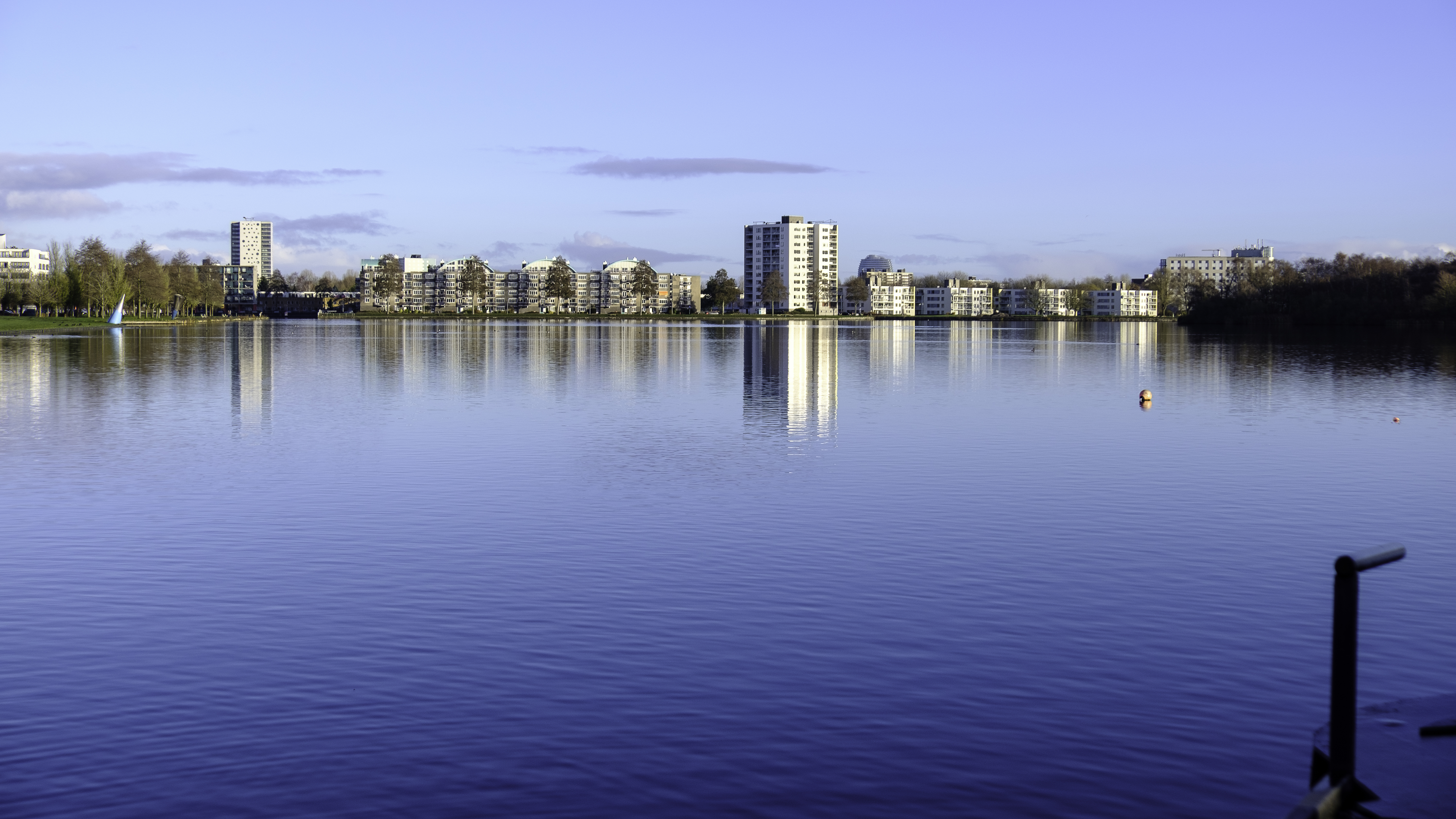 Gezicht op M.K. Gandhiplein Groningen over het Hoornse Meer